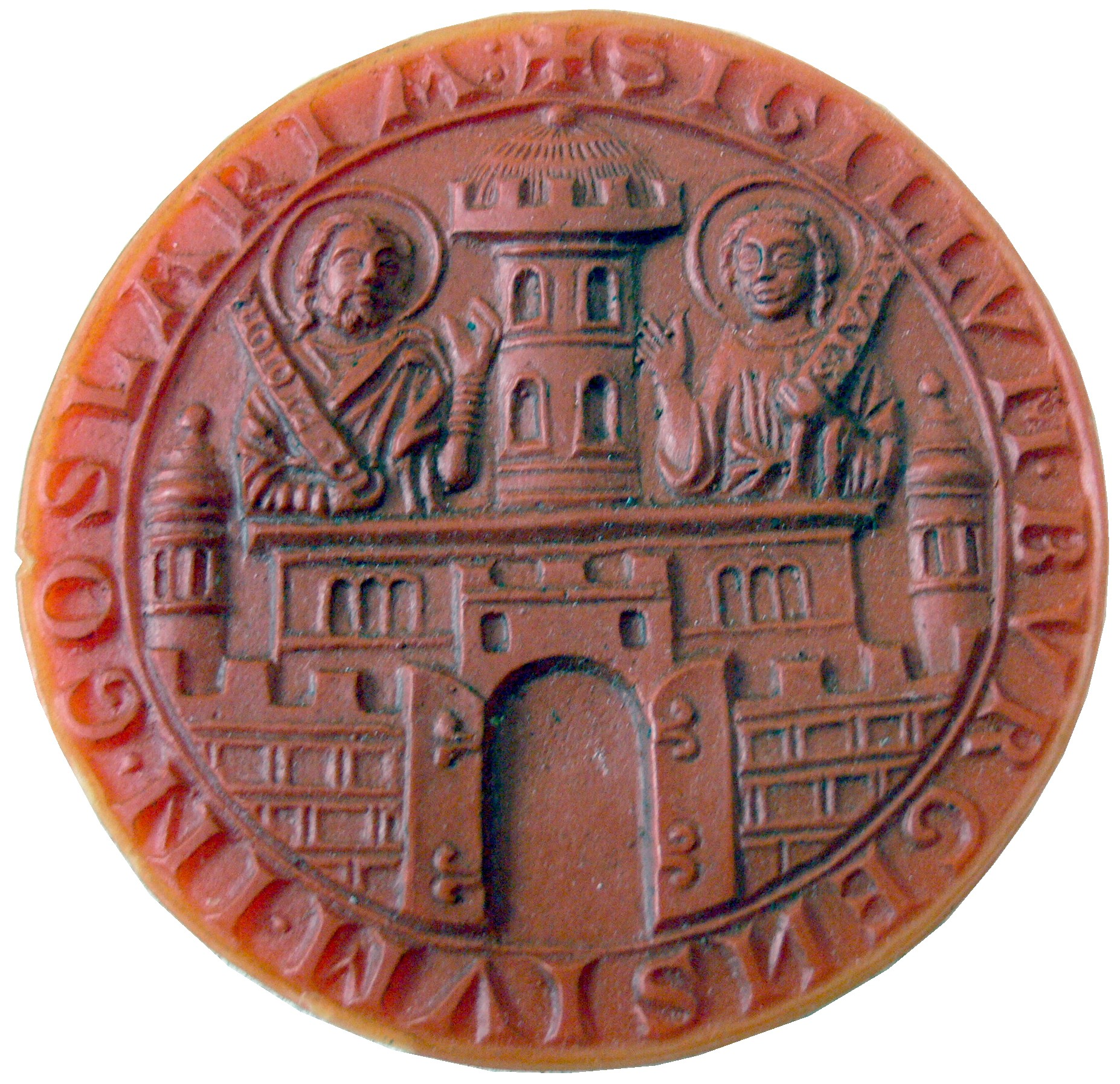 Stadtsiegel von Goslar 1240. Umschrift: „Sigillum Burgensium in Goslaria“.